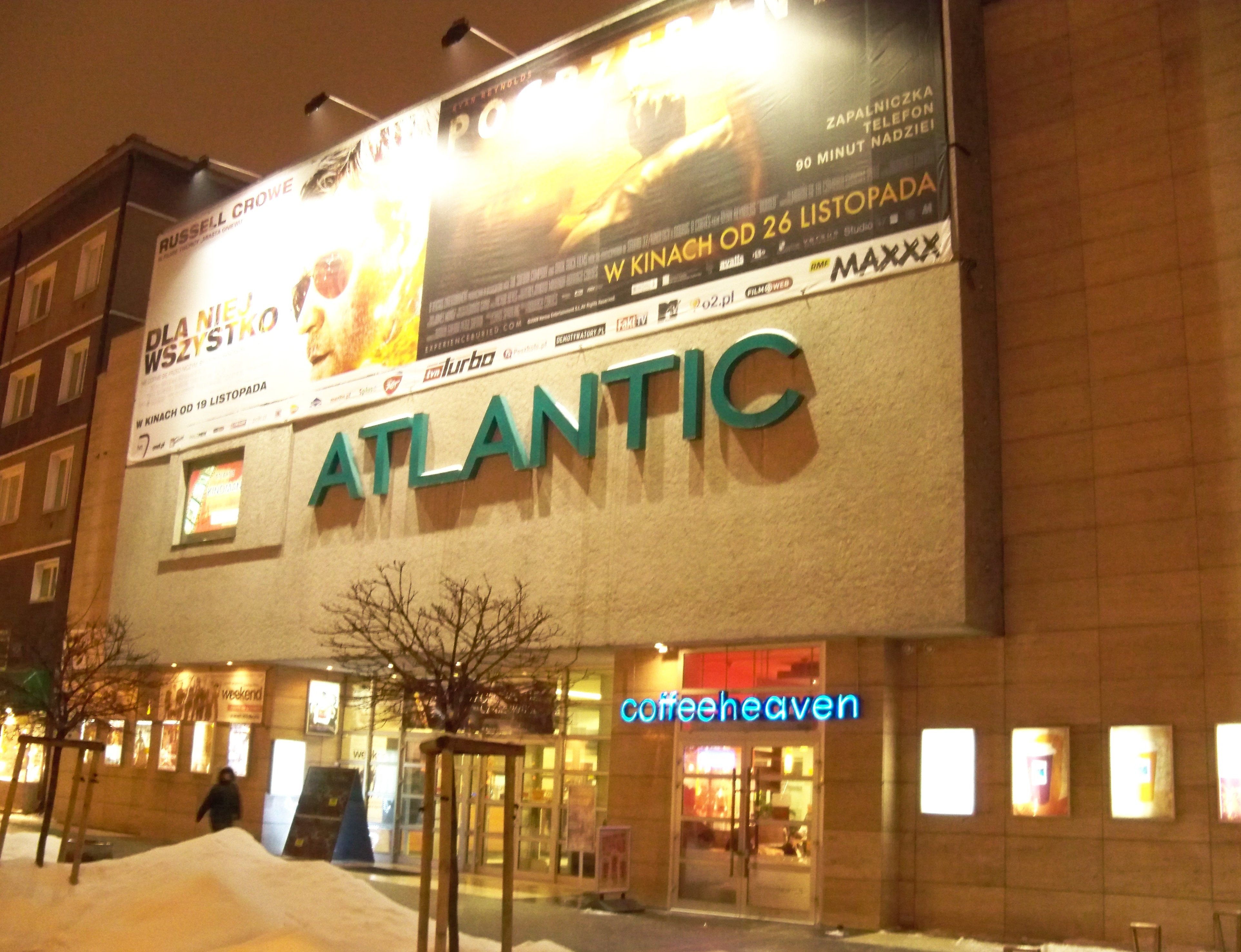 Kino Atlantic. Ul. Chmielna 33 w Warszawie.